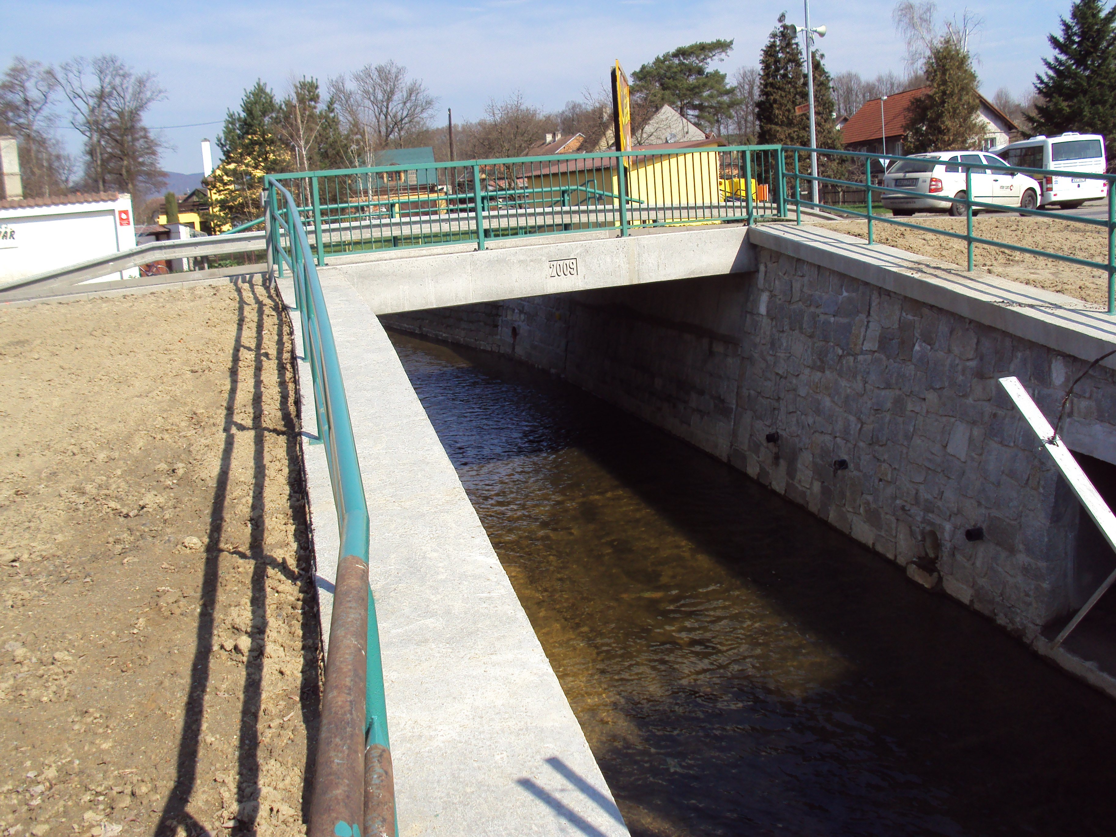 Česky: Nový silniční most přes potok Šporka v Dolní Libchavě